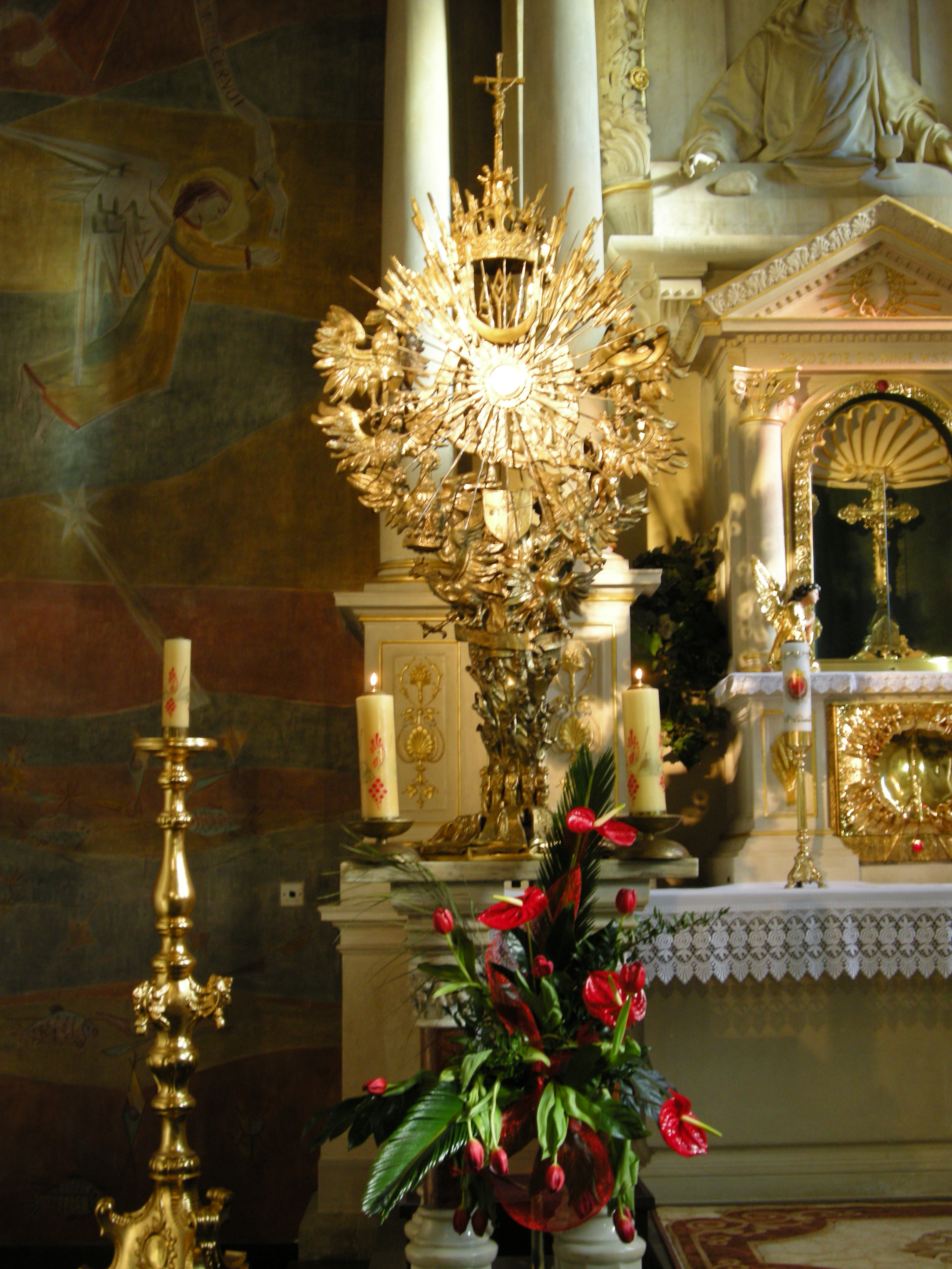 Monstrancja wykonana z okazji 200-lecia diecezji tarnowskiej